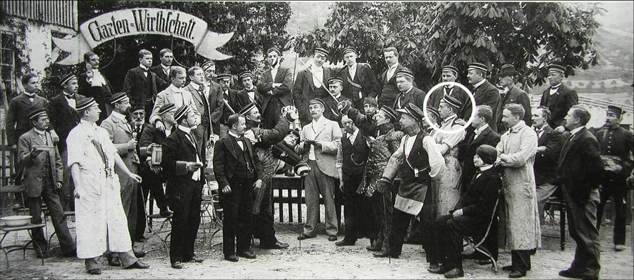 Pauktag in Jena im Jahre 1901. Eine Mensur zwischen den schlagenden Studentenverbindungen Rhenania Leipzig und Borussia Jena. Der junge Ferdinand Sauerbruch steht rechts außen (eingekreist) mit der Preussenmütze als Paukarzt.